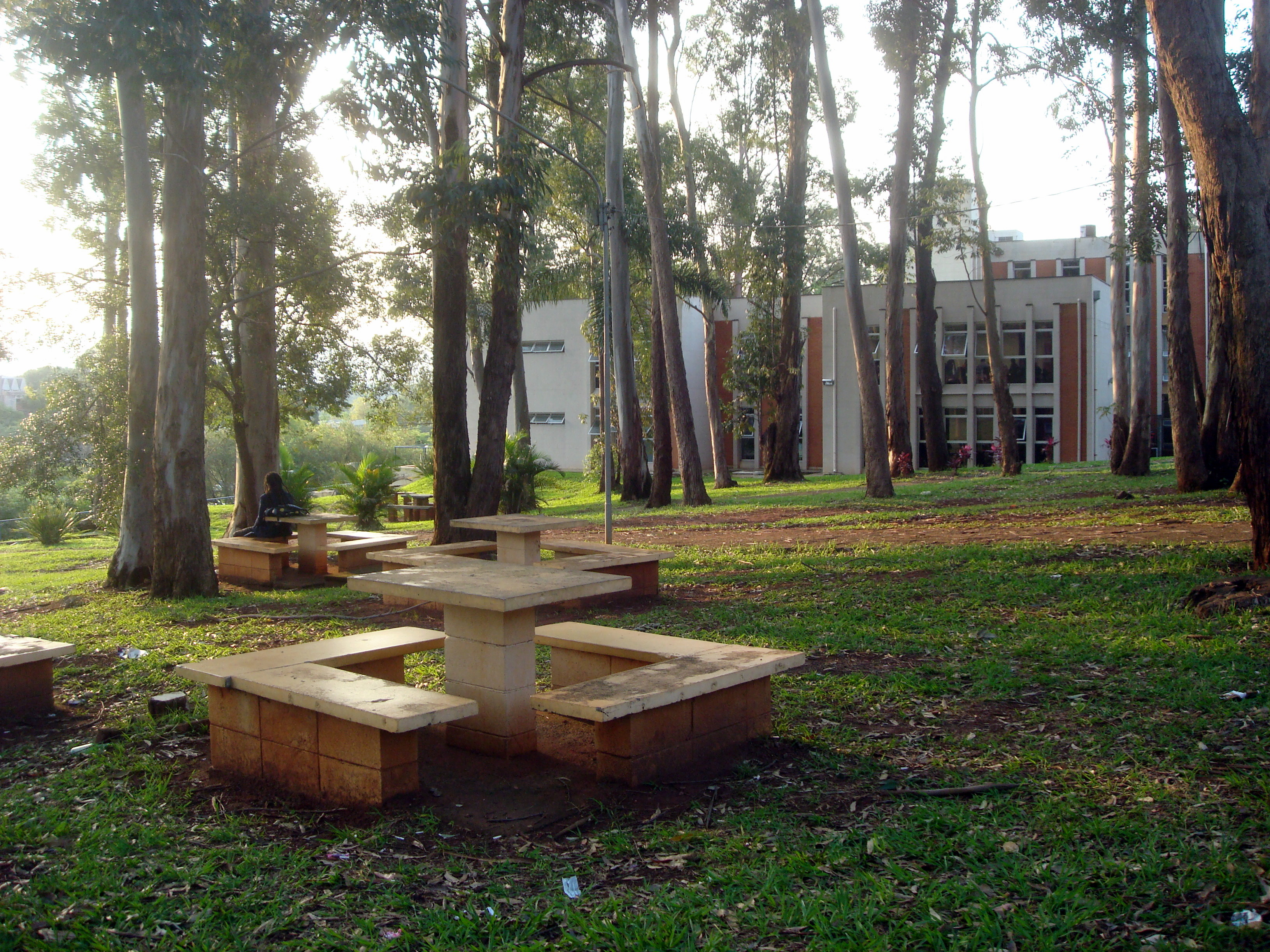 jardim no morrinho da Educação